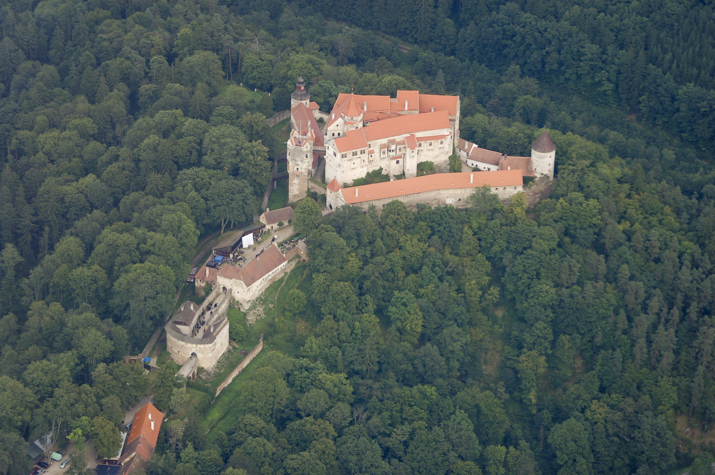 Letecký snímek hradu Perštejn